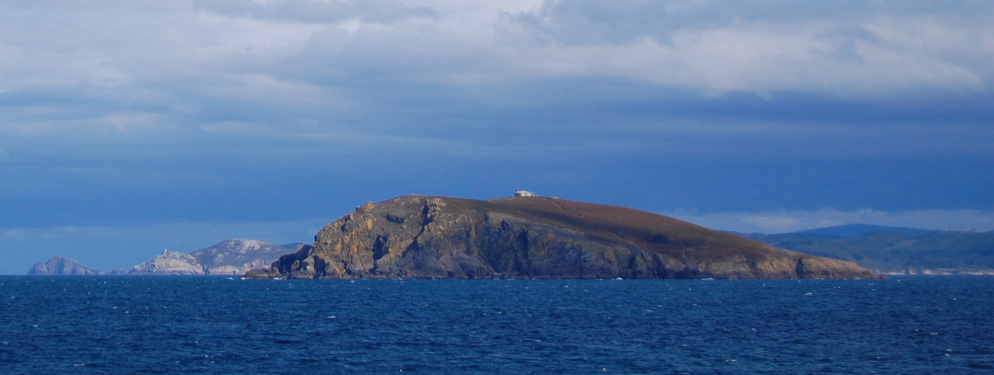 Illa Coelleira no concello do Vicedo, entre as rías do Barqueiro e de Viveiro, fronte a punta do Embarcadoiro. Ó fondo poden albiscarse o illote do Ansarón, a punta do Roncadoiro e a boca da ría de Viveiro. En último plano parece distinguirse parte da punta de Morás. A paisaxe pertence ó Lugar de Importancia Comunitaria Costa da Mariña Occidental. This image was rotated with GIMP (-0.55º).